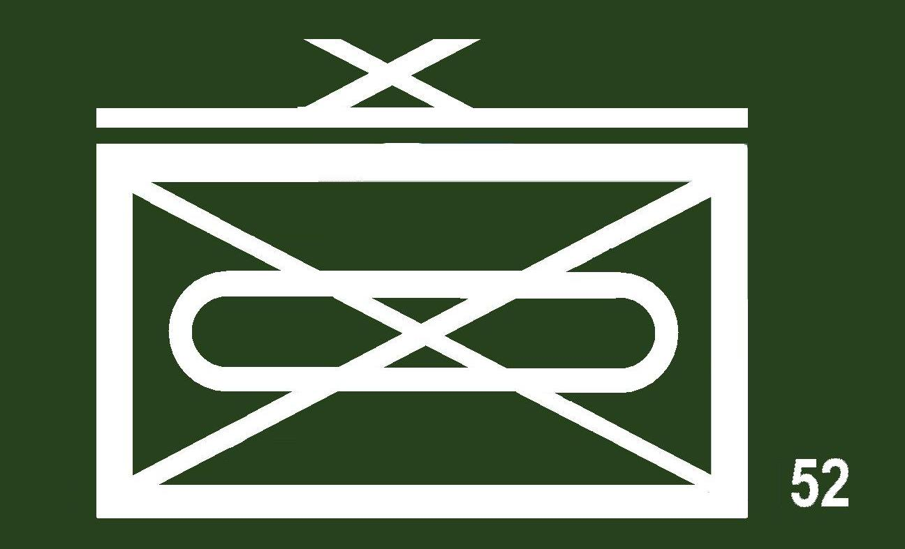 Heimatschutzbrigade